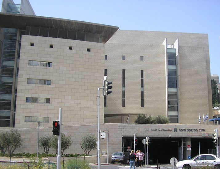 היכל המשפט בחיפה. צולם על ידי. שימוש חופשי לכל מטרה לכל דורש. אלמוג 18:09, 4 ינואר 2006 (UTC)